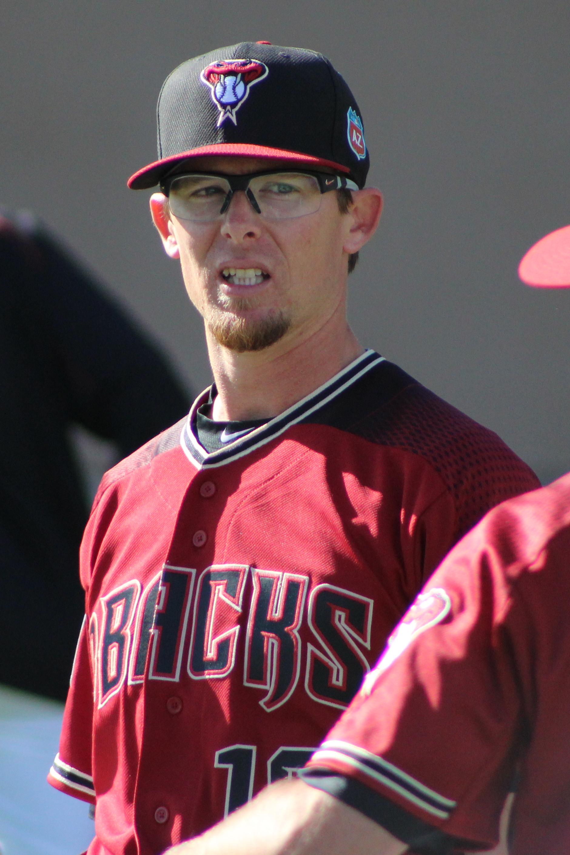 Tyler Clippard